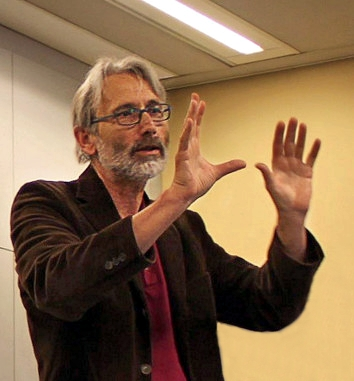 Peter Ohlendorf (* 1953), deutscher Filmemacher. Hier bei einer Diskussion nach einer Vorführung seines Films Blut muss fließen am 12. Oktober 2012 in Hannover.